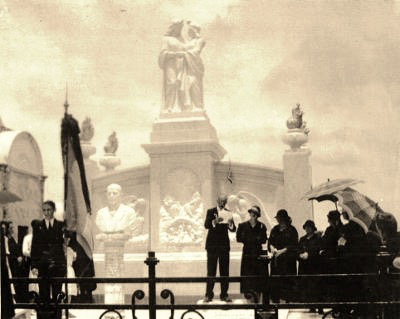 Fotografía de la inauguración del Mausoleo Italiano en el Cementerio General de San José.